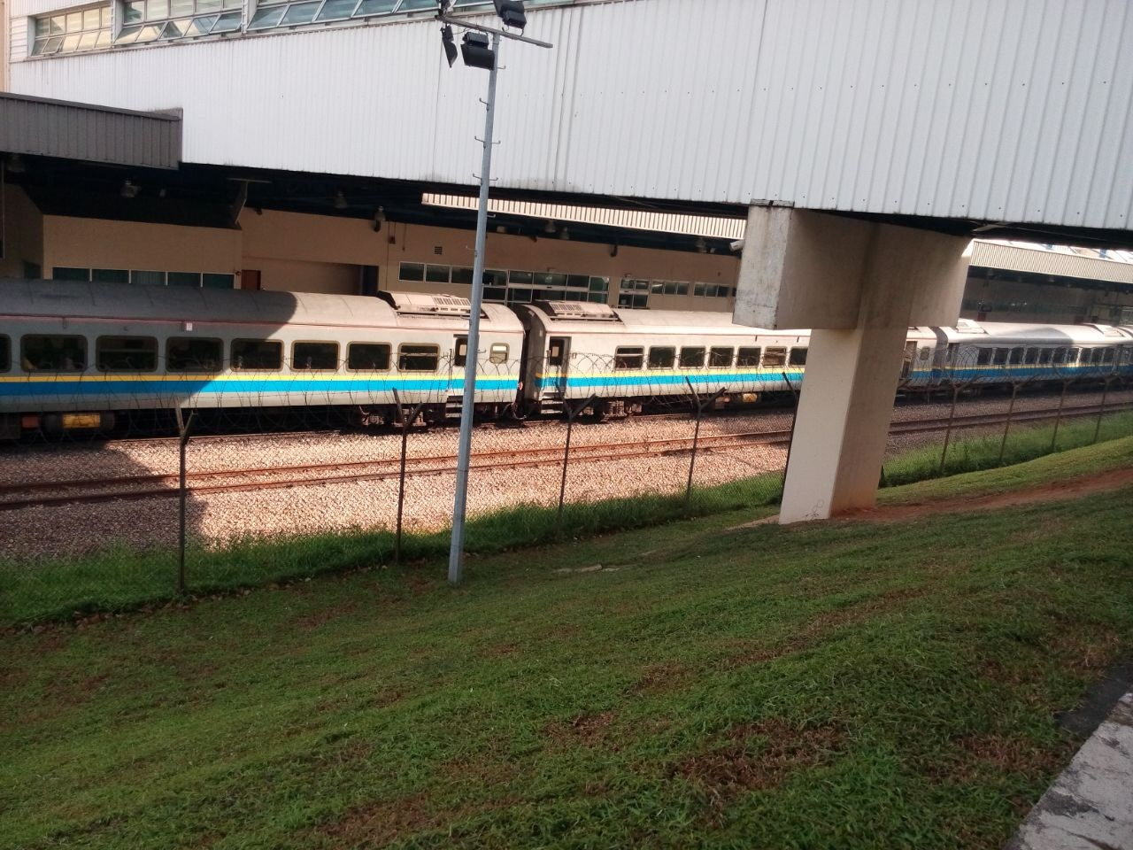 Woodlands Singapura